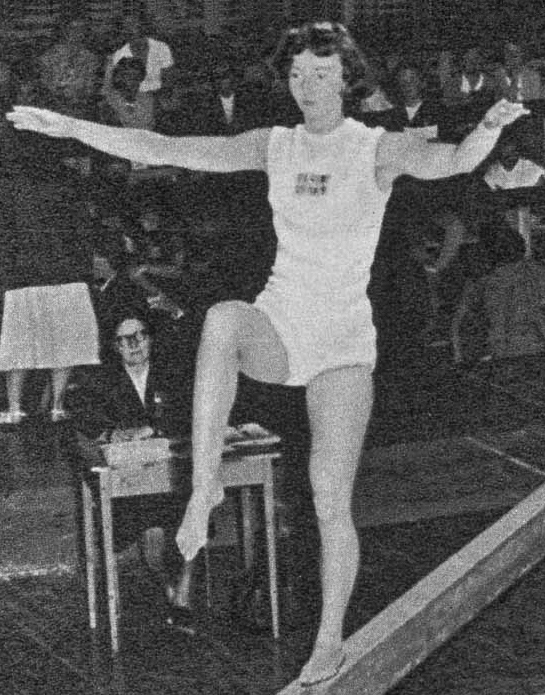 Vanja Blomberg